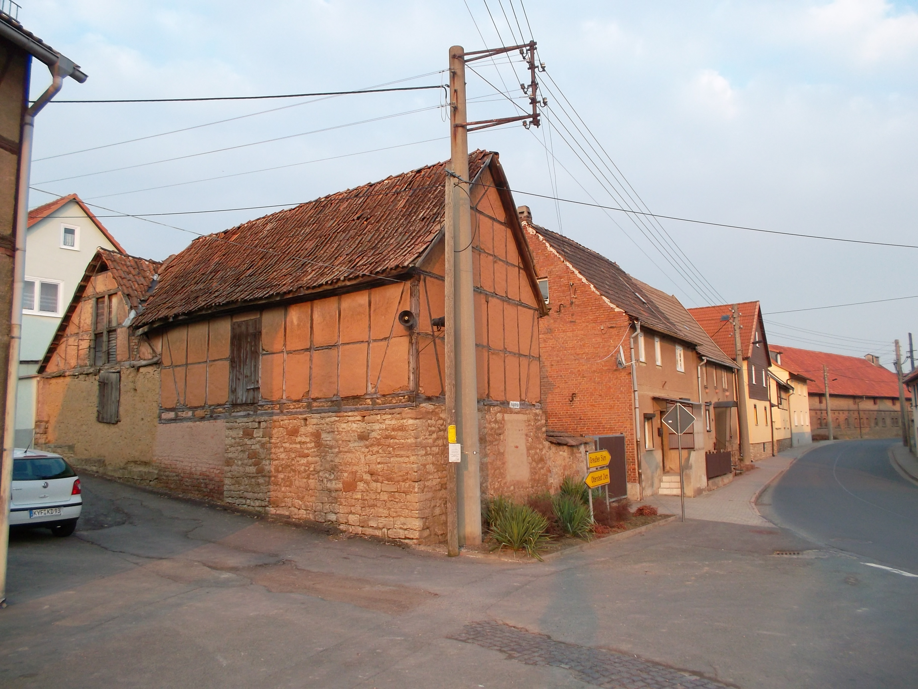 2012 in Wasserthaleben